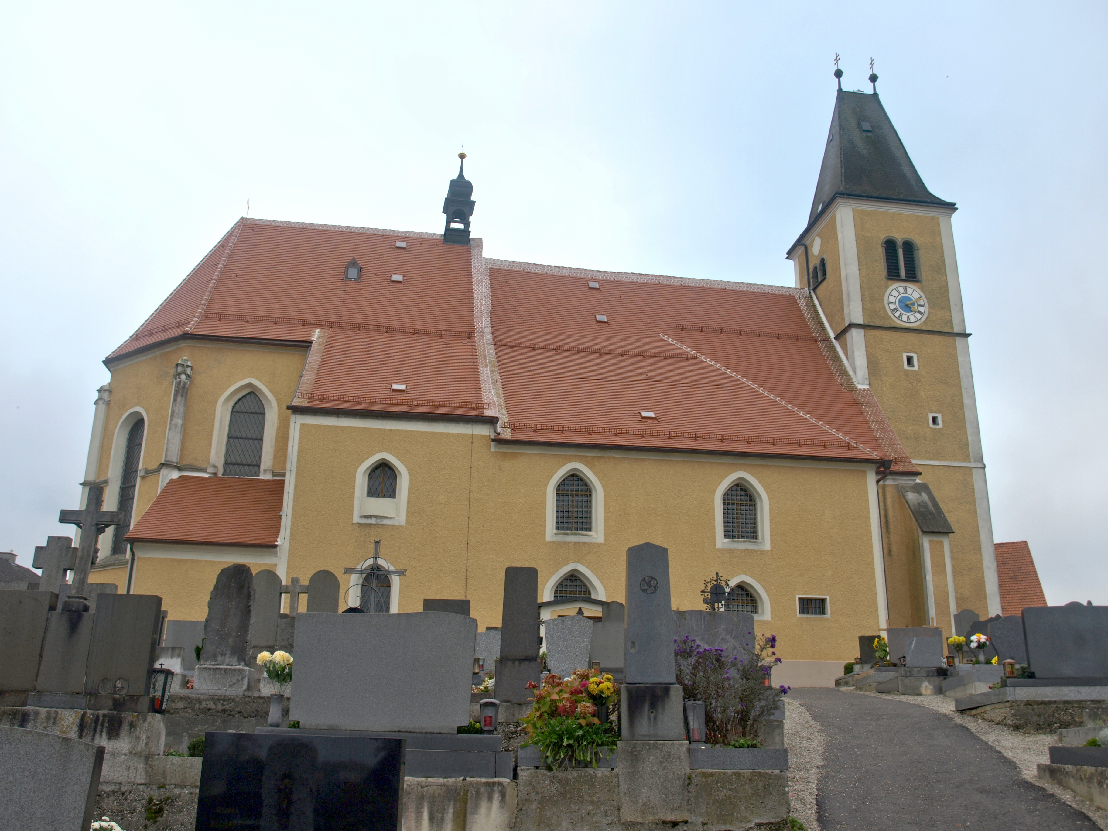 Kath. Pfarrkirche Mariae Himmelfahrt